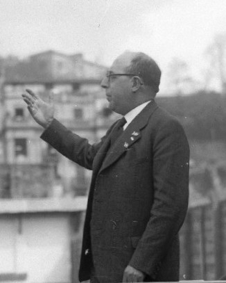 Ramón Otero Pedrayo en el Aberri Eguna organizado por EAJ-PNV en el antiguo frontón Maitea de Atotxa en abril de 1933 en San Sebastián. Otero Pedrayo fue uno de los asistentes al Aberri Eguna de 1933, celebrado en el frontón Maitea, en Atocha, junto con Ewald Ammende (Secretario del Consejo de Minorías Nacionales, de Ginebra), Francesc Maspons (Partit Nacionalista Catalá), Manuel Carrasco i Formiguera (Unió Democratica de Catalunya).El original pertenece a Kutxa Fototeka y se puede consultar en la web así como en : 1933. urtean EAJ-PNVk Donostian Atotxako Maitea frontoi zaharrean antolaturiko Aberri Eguneko hizlari ezezaguna.Argazkiaren originala Kutxa Fototekak kudeatzen du eta webgunean eta atarian erakusten du